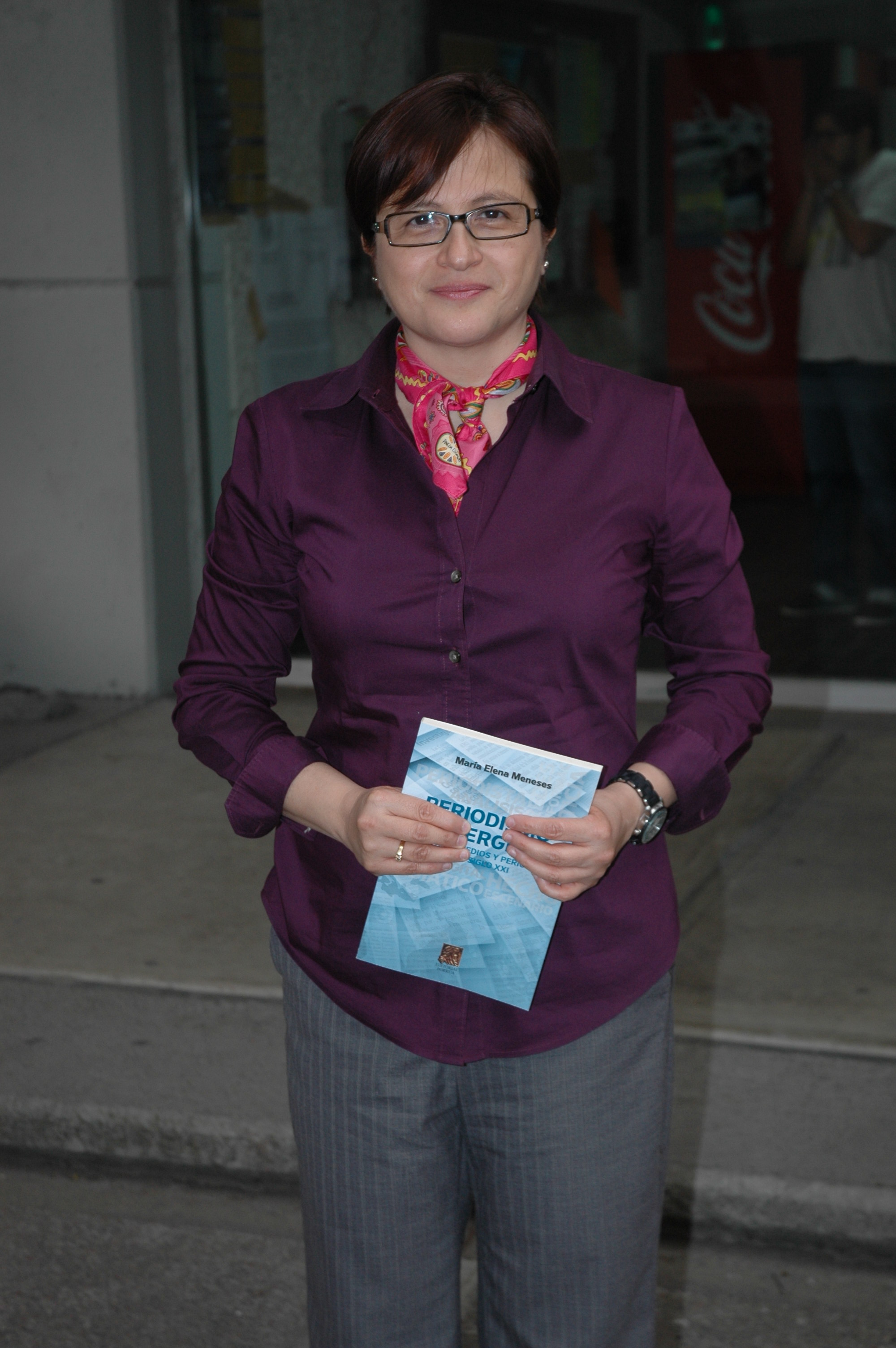 1 Dra. María Elena Meneses con su libre Periodismo Convergente en ITESM Campus Ciudad de México